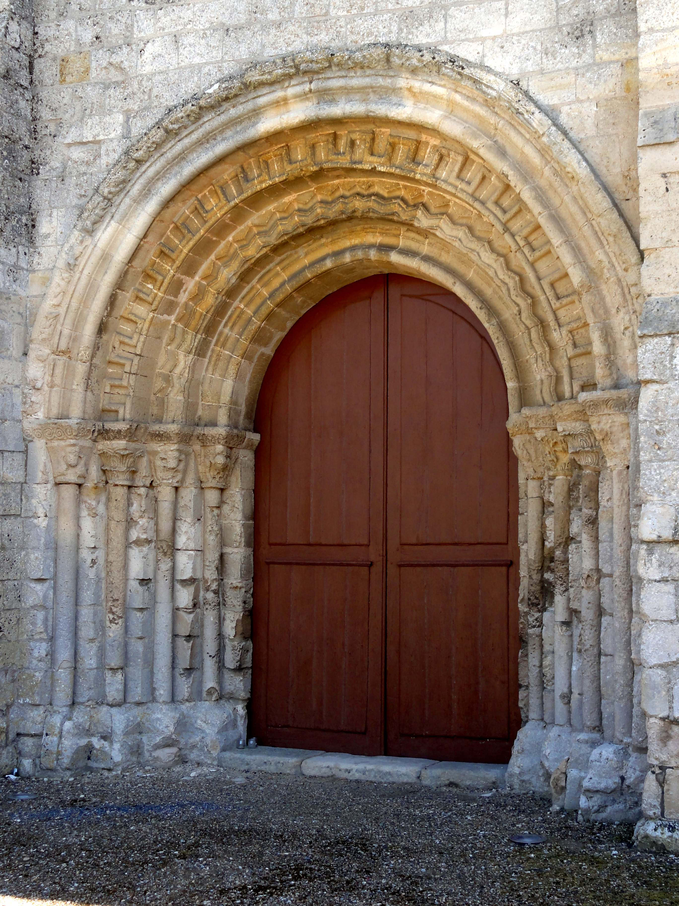 Église Notre-Dame-de-la-Nativité de Lavilletertre - voir titre.